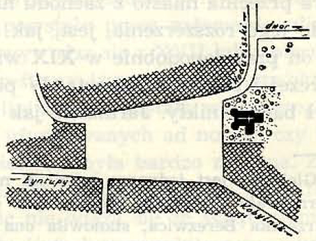 Беларуская (тарашкевіца): Камаі (Kamaji)